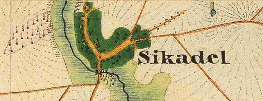 Siegadel, Gemeindeteil im Ortsteil Goyatz der Gemeinde Schwielochsee, Landkreis Dahme-Spreewald, Brandenburg, Deutschland, Ausschnitt aus dem Urmesstischblatt 4050 Straupitz von 1846